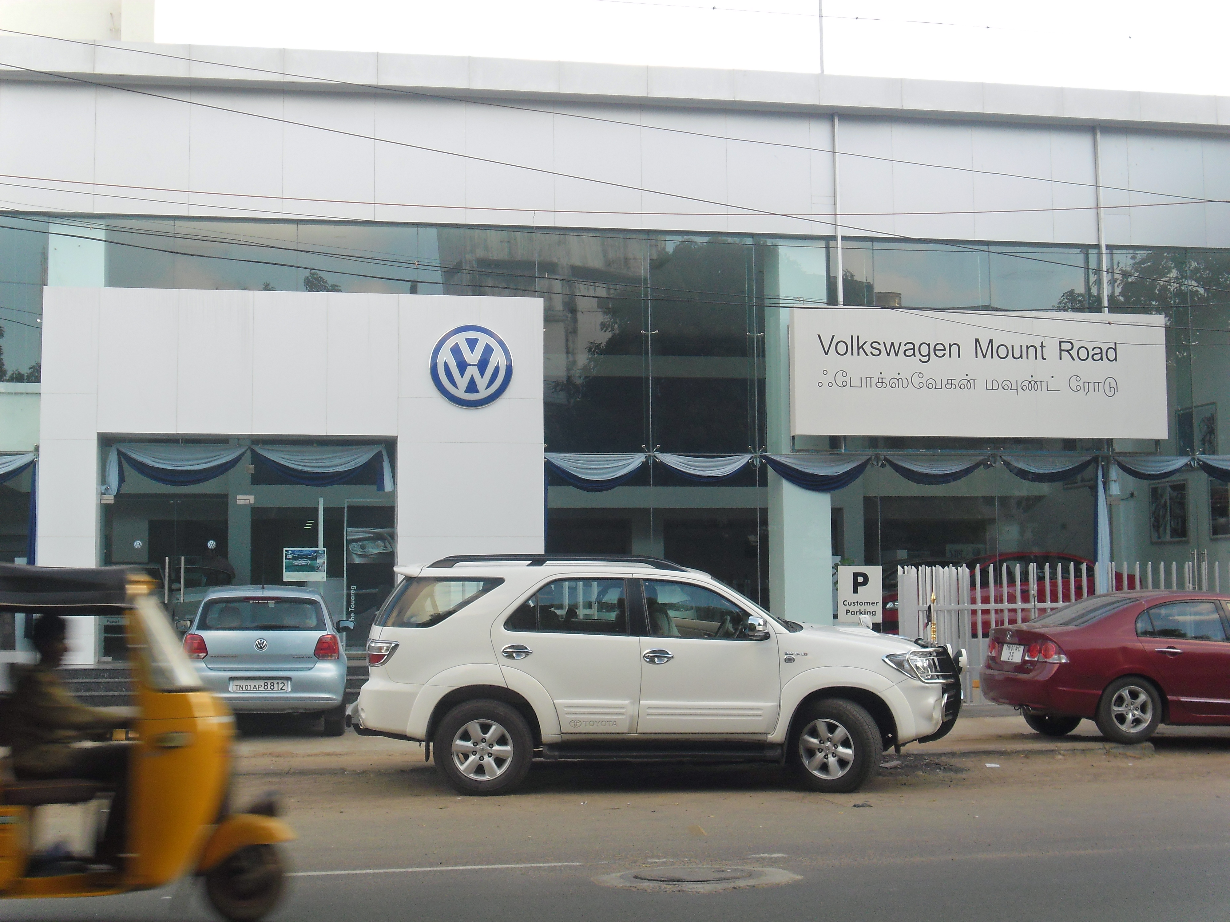 வோல்க்ஸ்வேகன் சென்னை கிளை